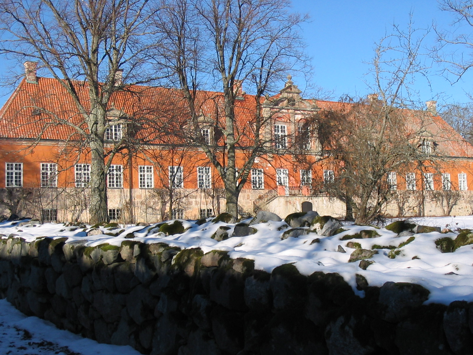 Fotat av turist 2004.